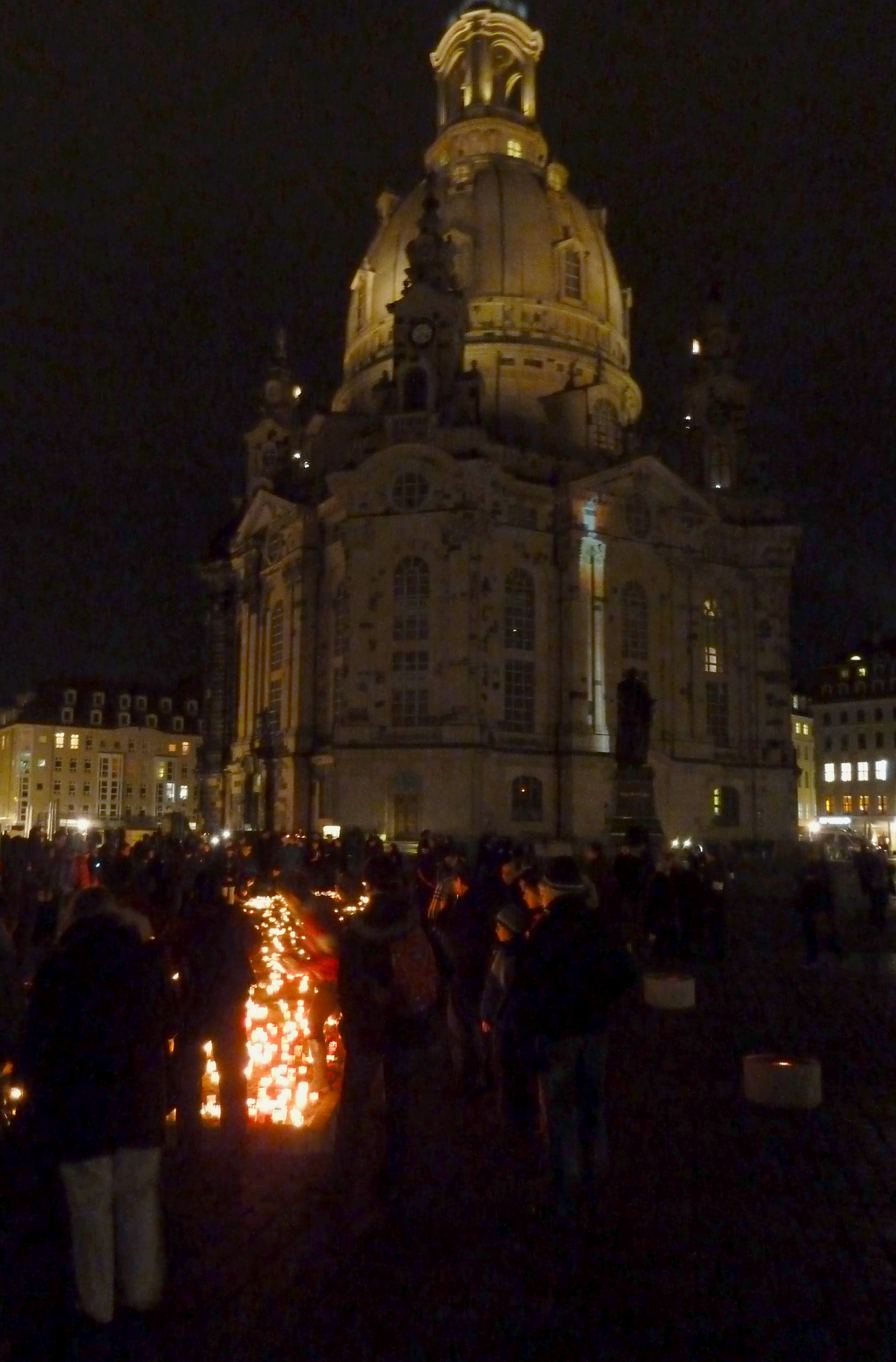 Gedenken an den 13. Februar 1945: Vor der Dresdner Frauenkirche stellen Passanten Kerzen in Form einer großen Kerze auf, gleichzeitig wird eine solche an die Außenwand der Kirche illuminiert.